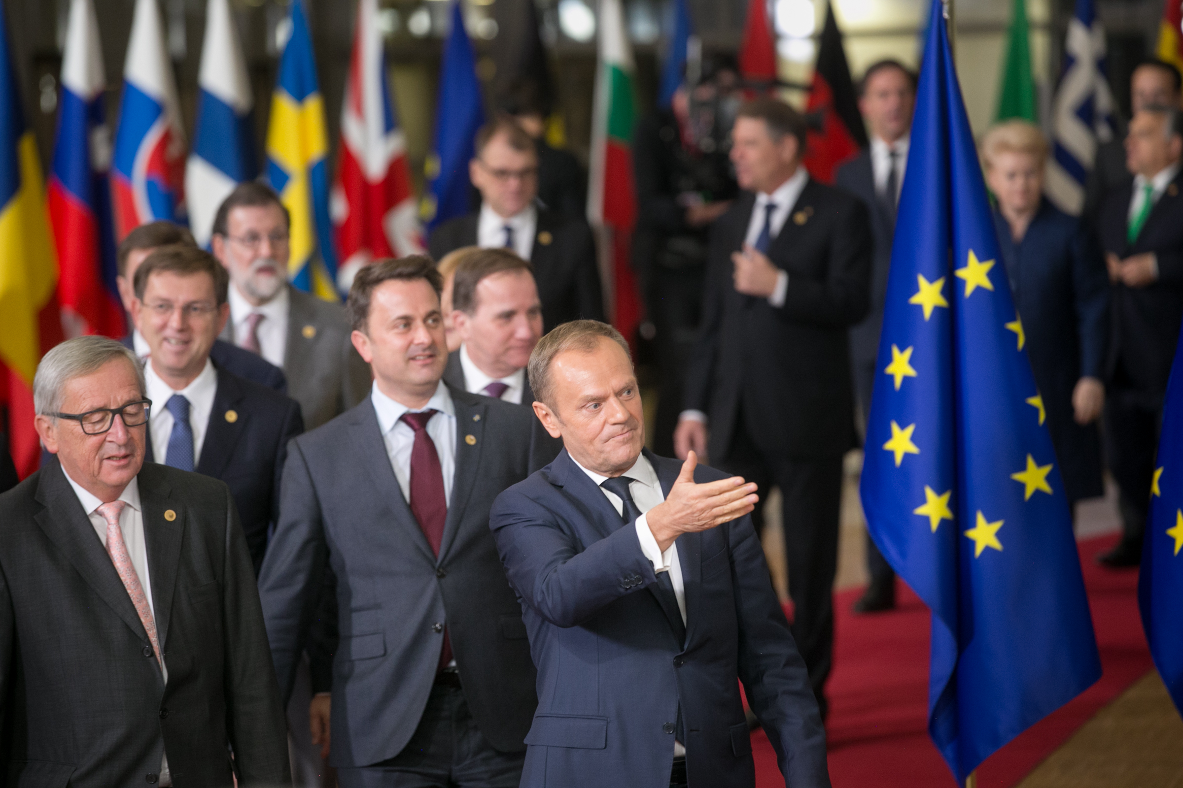 Photo: Tauno Tõhk (EU2017EE)